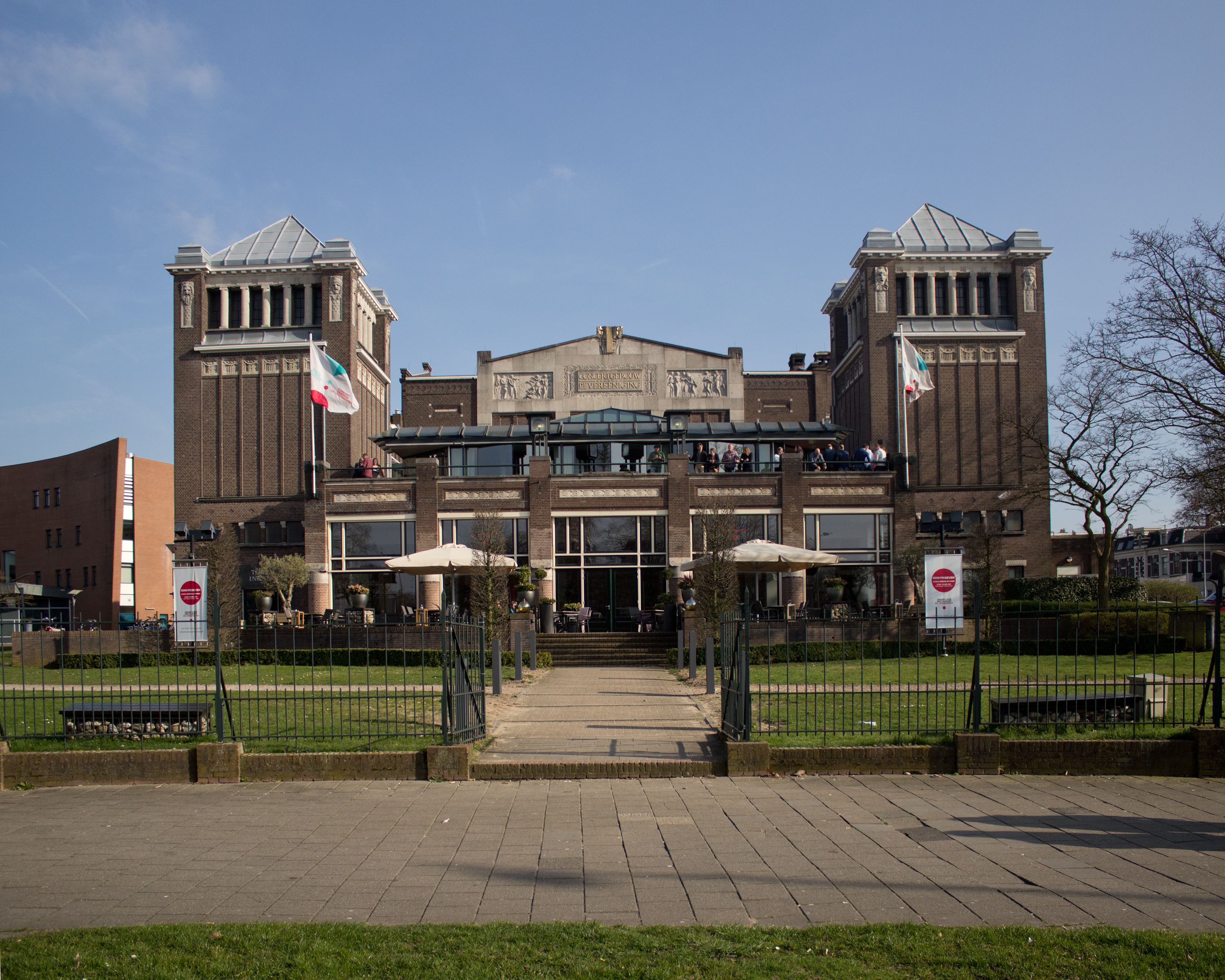 Gebouw de Vereeniging, Nijmegen.